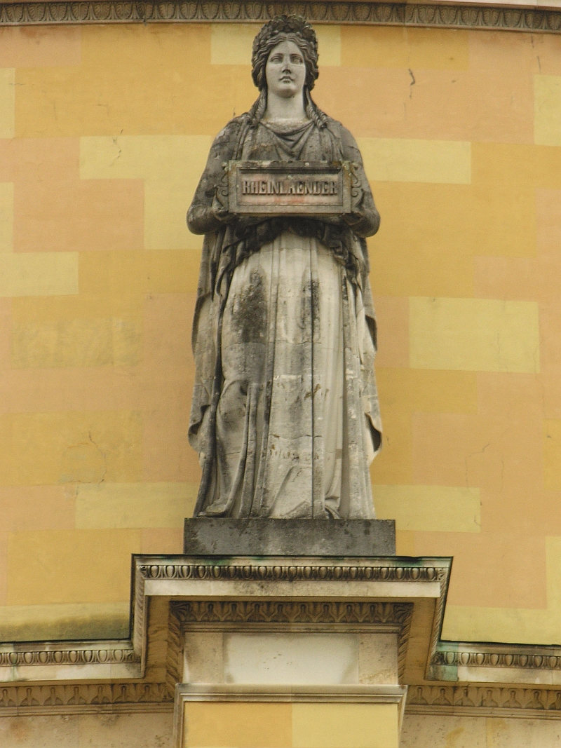 Diese Statue an der Aussenseite der Befreiungshalle in Kelheim steht für den Volksstamm der Rheinlaender (Schreibweise beachten), Höhe der Statue 580 cm. Sie ist eine von 18 Statuen, die nach Modellen des Bildhauers Johann Halbig geschaffen wurden.